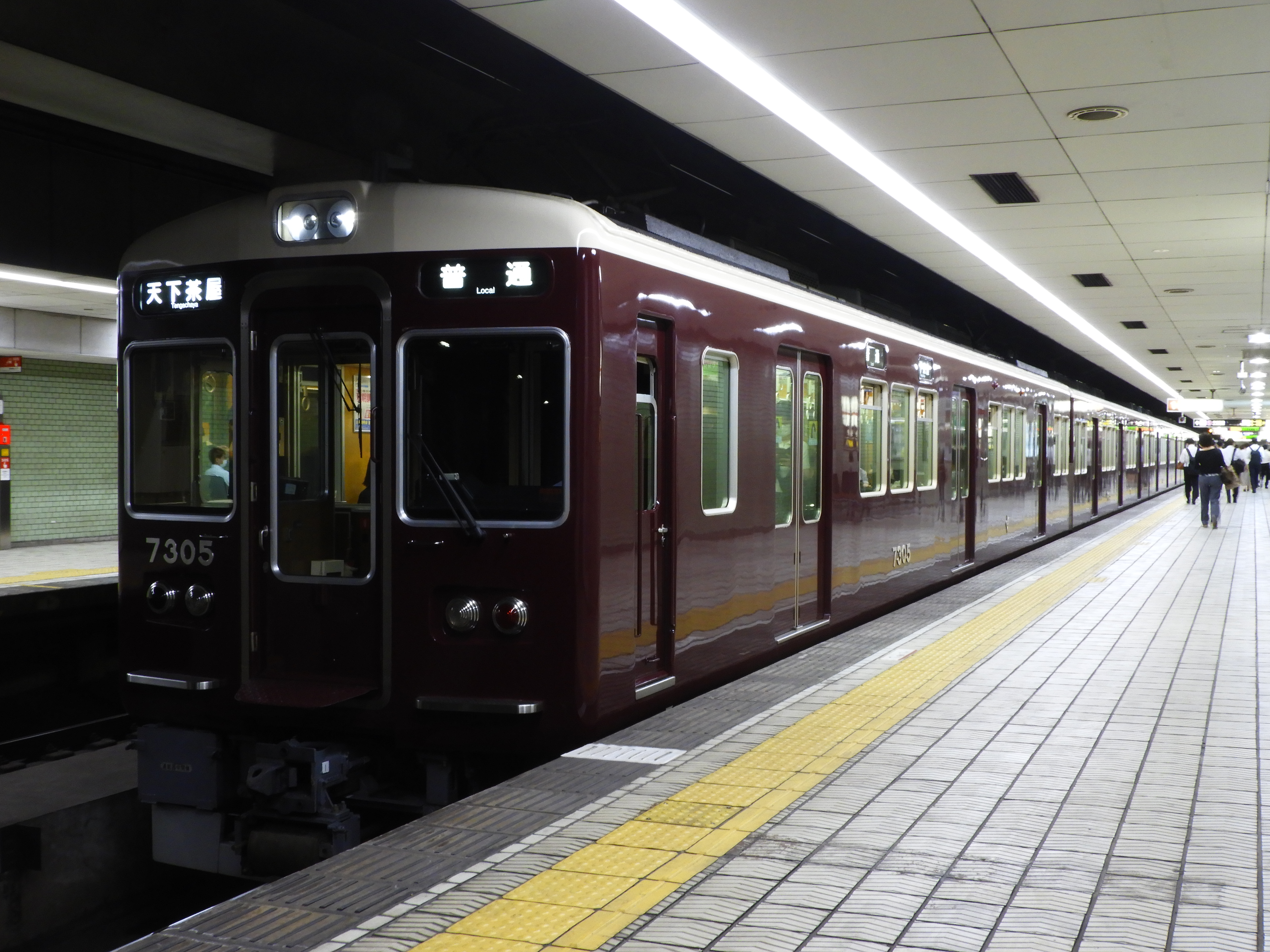 阪急7300系7305F(リニューアル車) Osaka Metro堺筋線日本橋駅 Nikon Coolpix B700